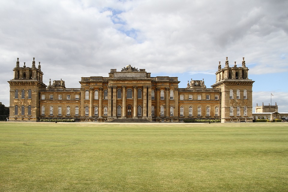 Plácio onde Churchill nasceu